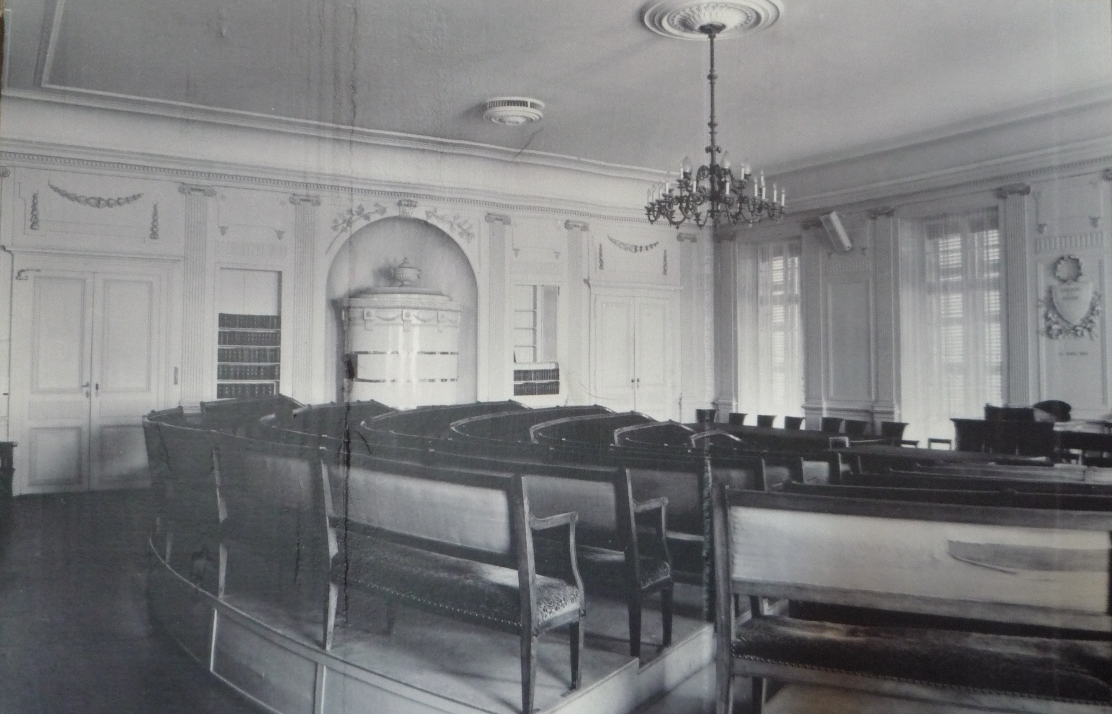 Photo d'une photo se trouvant sur le mur du bâtiment du Grand Conseil du canton de Vaud, représentant l'ancienne salle du Grand Conseil en 1964 (dite « salle Perregaux »), avant l'incendie qui l'a détruite en 2002.